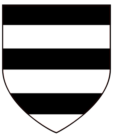 Escudo de armas del Imperio de Trebisonda